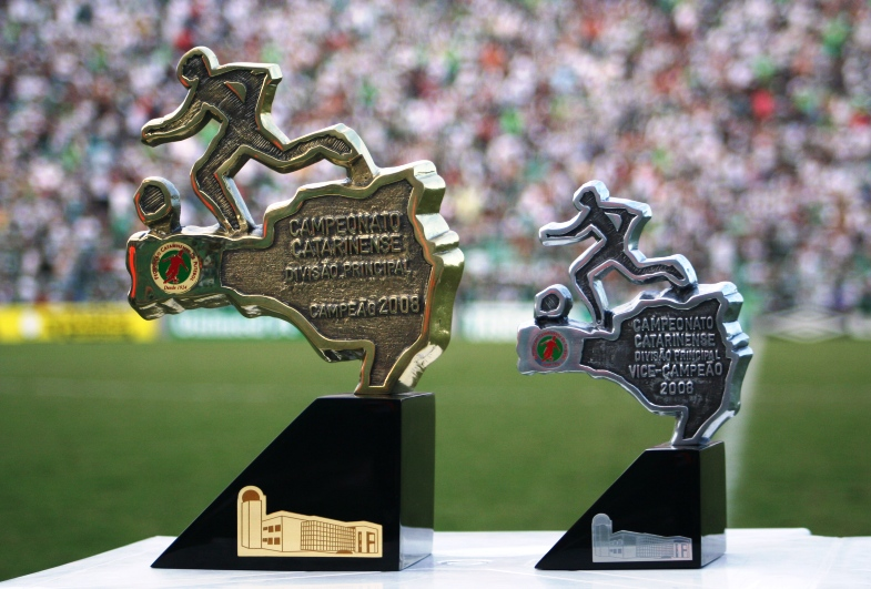 Troféus de 1o. e 2o. colocado. Figueirense x Criciuma Local: Estádio Orlando Scarpelli - Florianópolis/SC Data: 27/04/2008